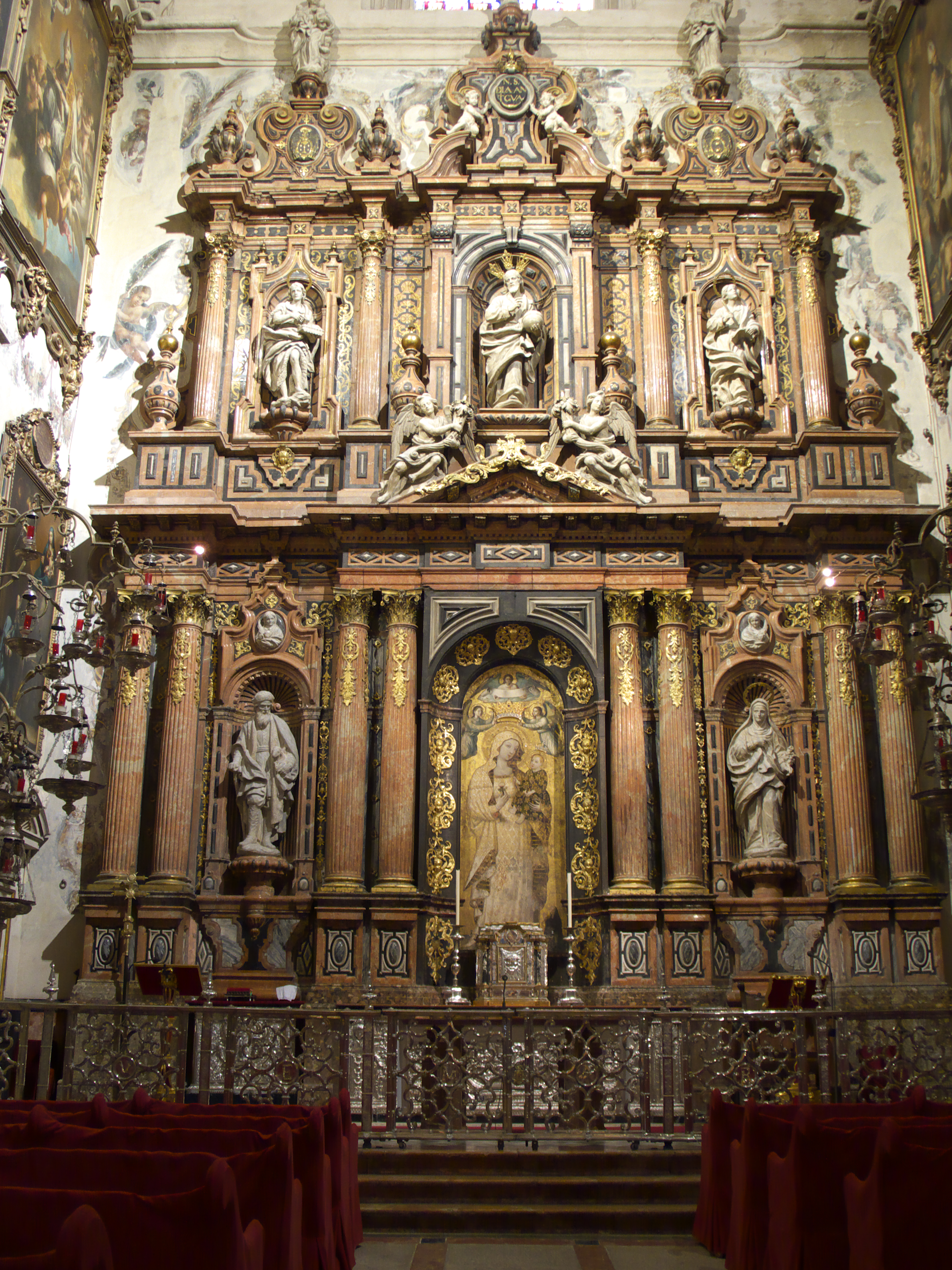 Catedral de Sevilla. Una de las tres pinturas murales medievales que existe, finales del siglo XIV. Ocupa el lugar del mihrab de la mezquita aljama. El retablo de mármoles (1734-1738) es obra de Juan Fernández de Iglesias, según proyecto de Pedro Duque y Cornejo.